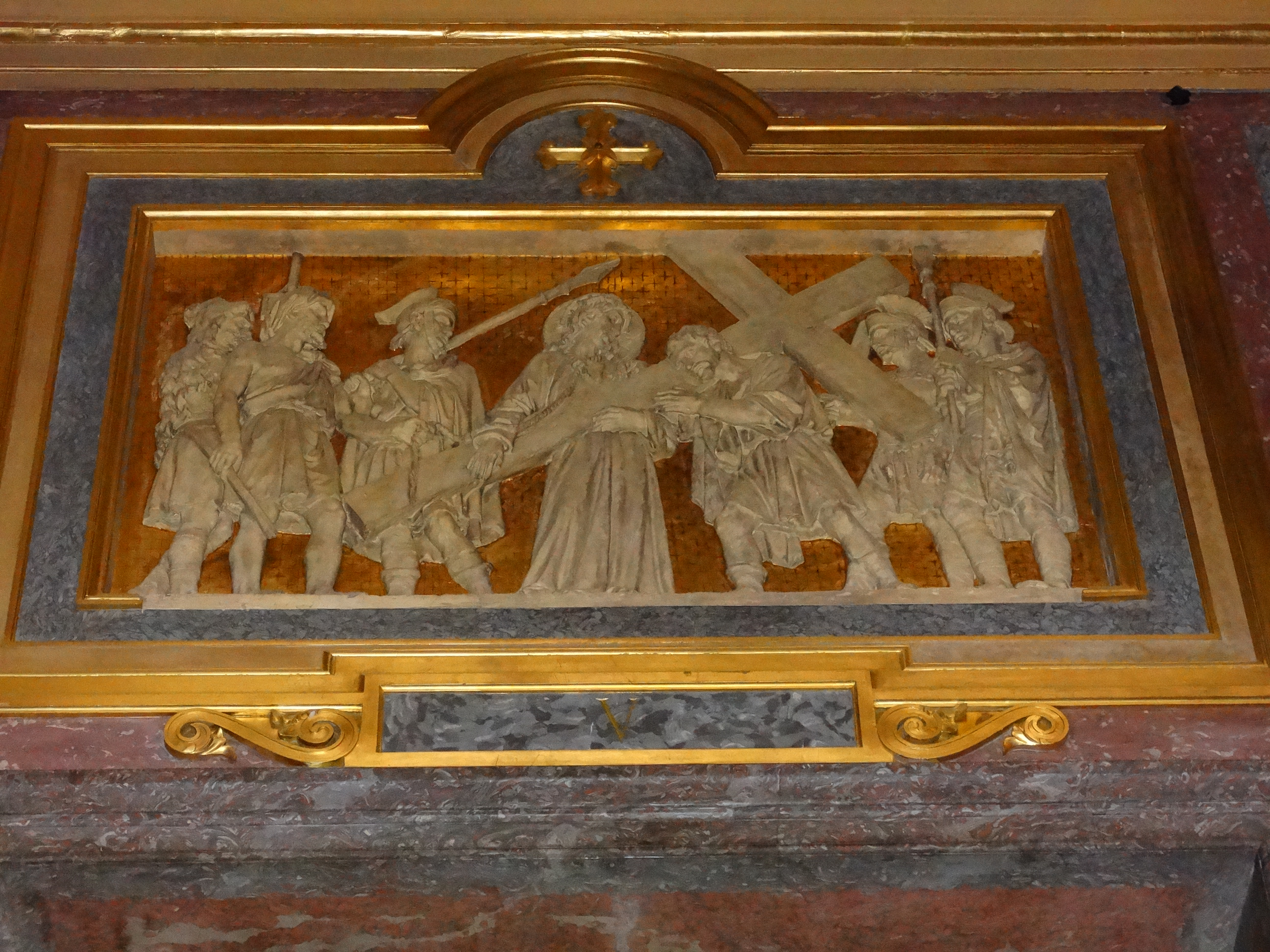 Chemin de Croix de la Cathédrale